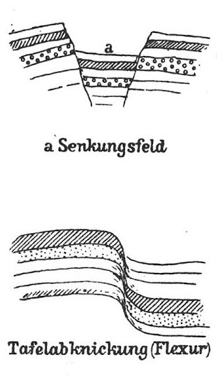 Diagramm: Bruchsenke, Verbiegungssenke